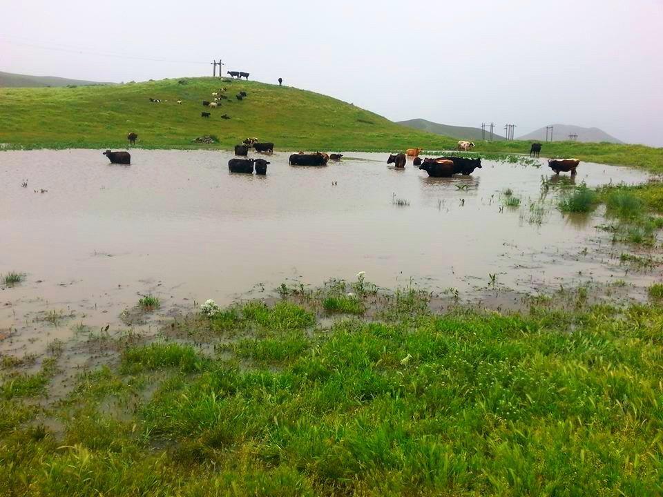 تالاب قالغانلو در شرق روستای خان کندی گرمی مغان